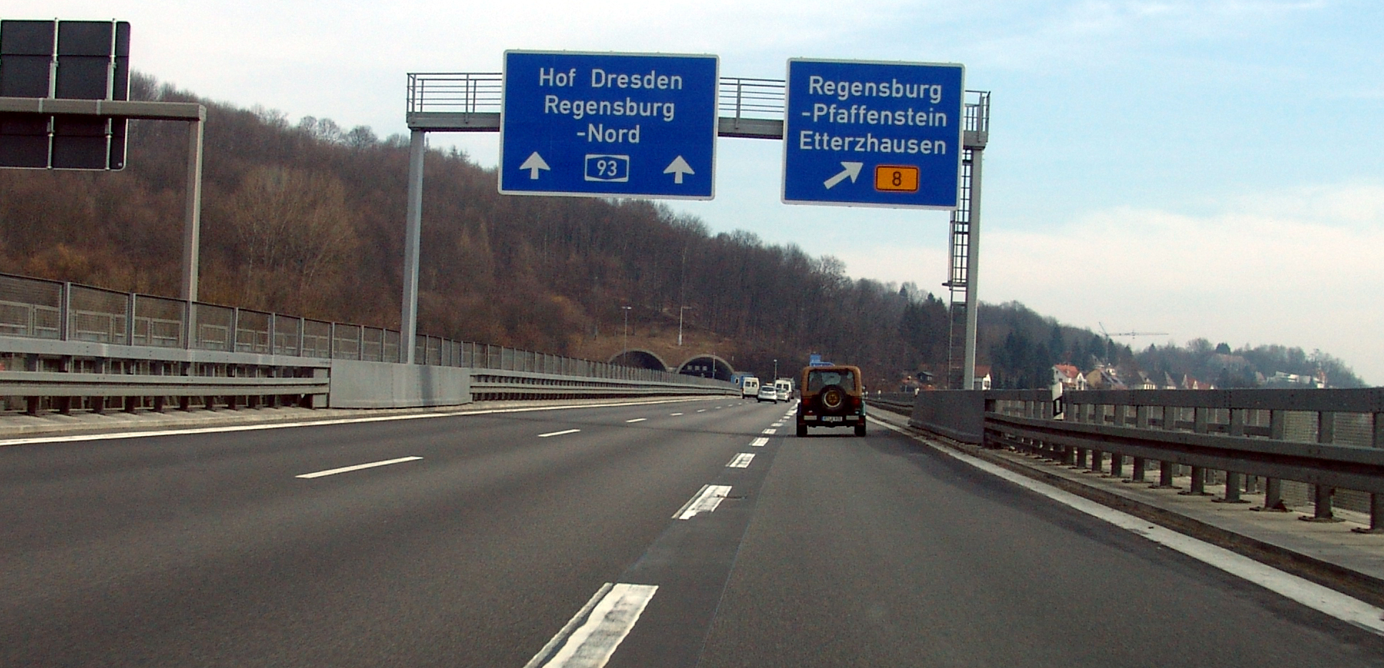 A93, Südseite des Pfaffenstein-Tunnel